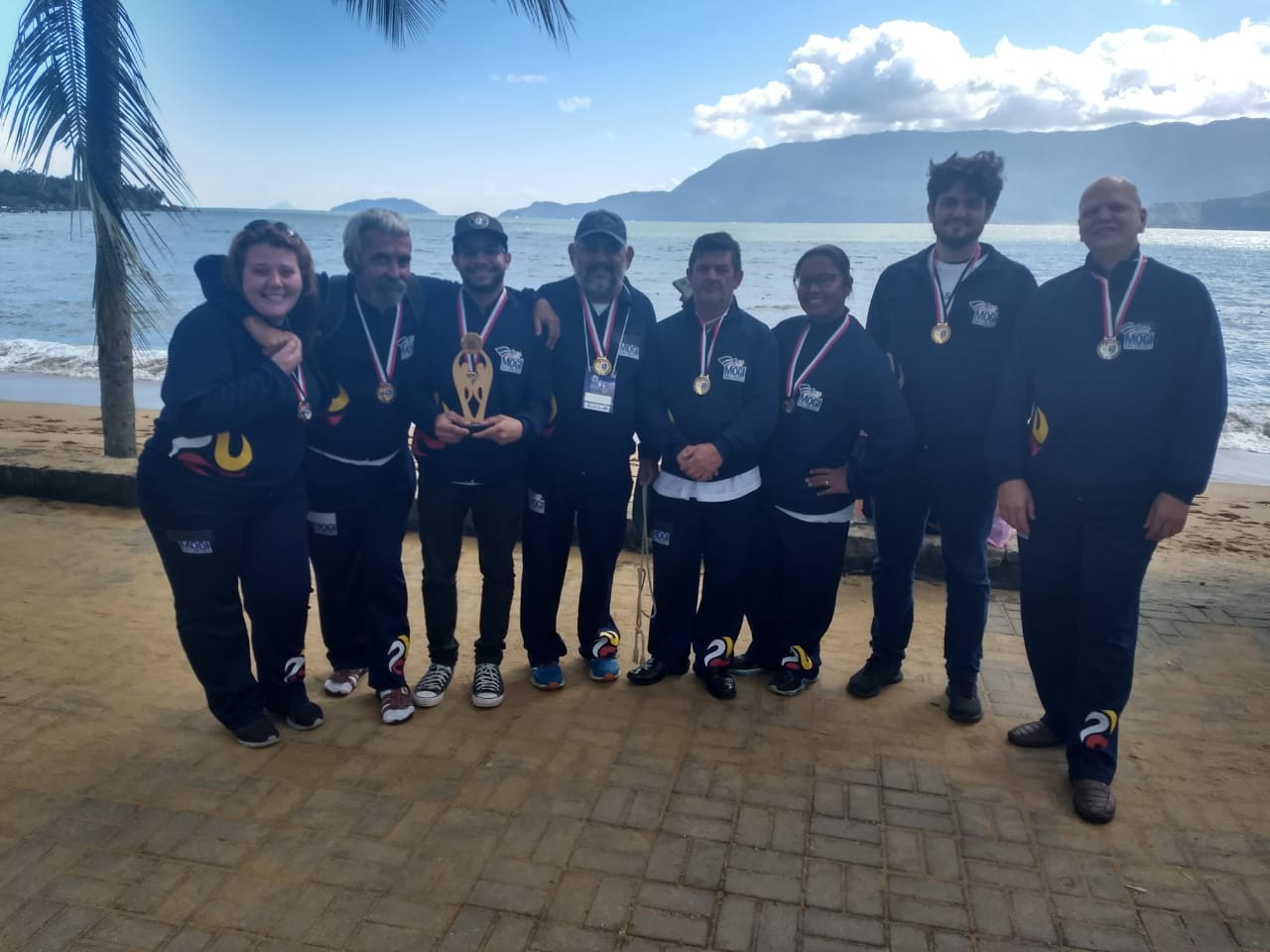 Após vencer os jogos regionais